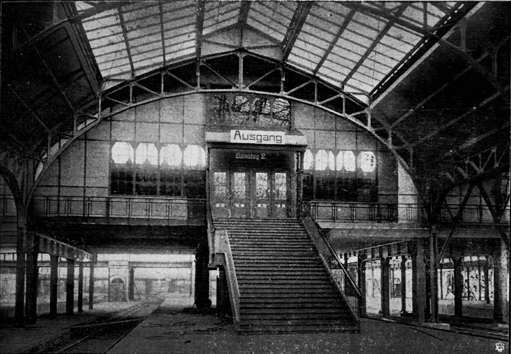 Inneres der Bahnsteighalle.